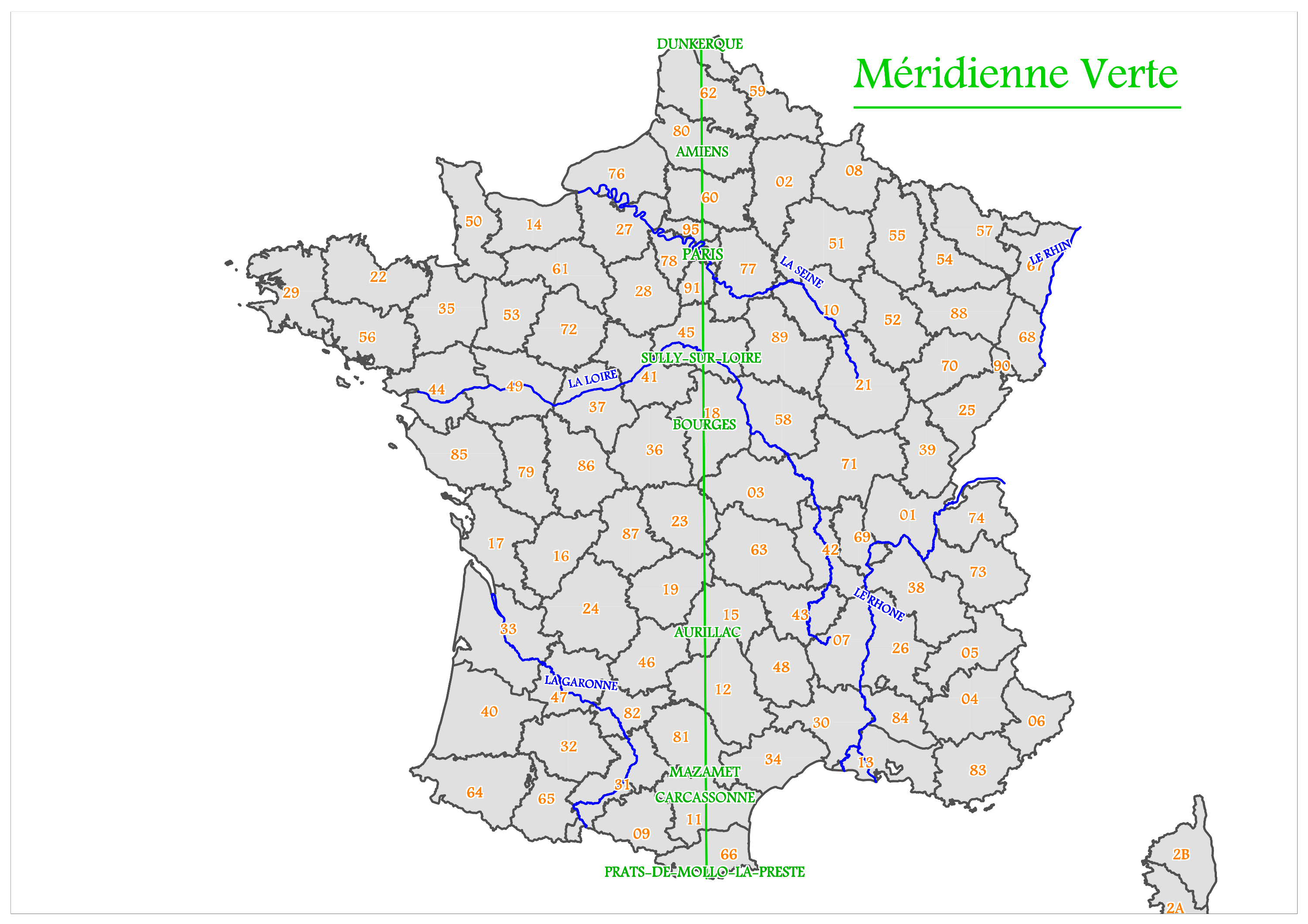 Carte réalisée par la classe de 1ère STAV (promotion 2011-2013) dans le cadre de l'option SIG-GPS dispensée au Lycée Agricole de Saint Pouange.